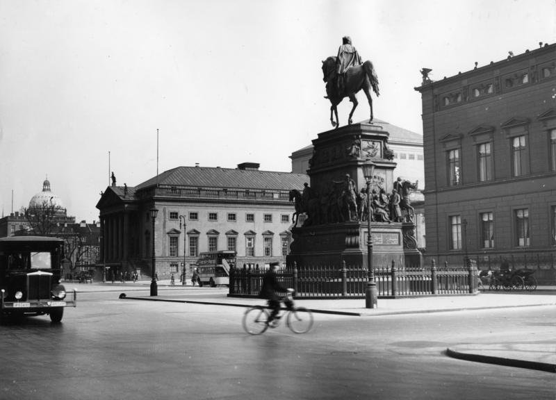 Berlin Staatsoper und Denkmal Friedrichs der Grosse von Rauch, hinten links die Kuppel des Schlosses